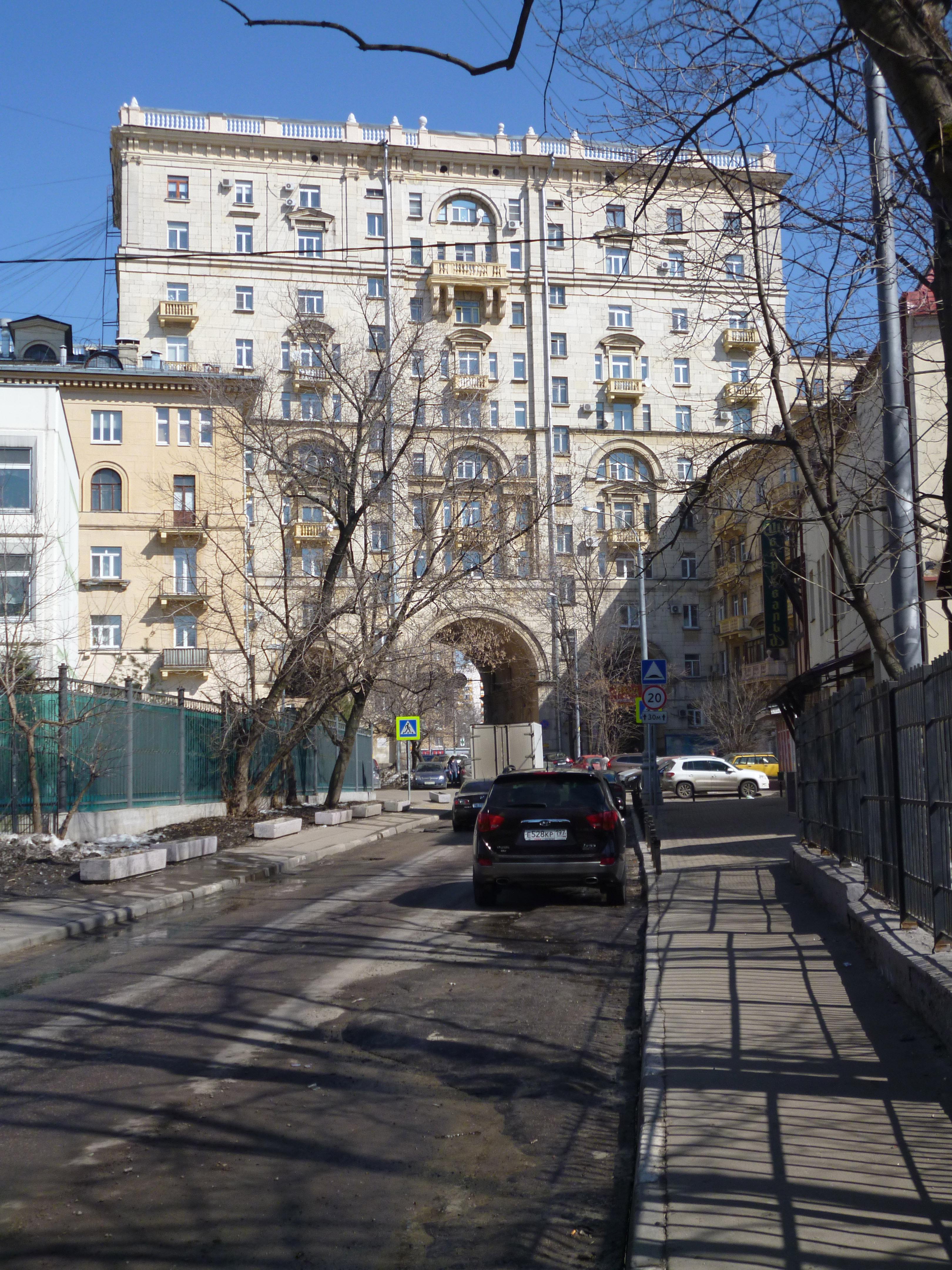 Арка в начале Песчаной улицы у перекрёстка с Ленинградским проспектом